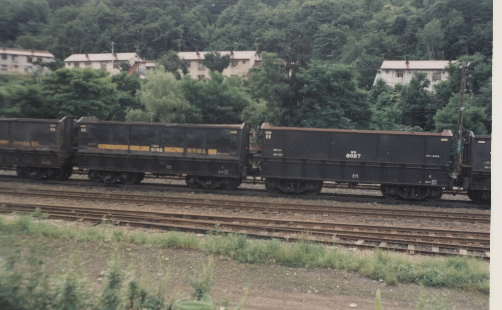 幌内線幌内駅に留置中の国鉄セキ3000形貨車とセキ8000形貨車セキ5102とセキ8027